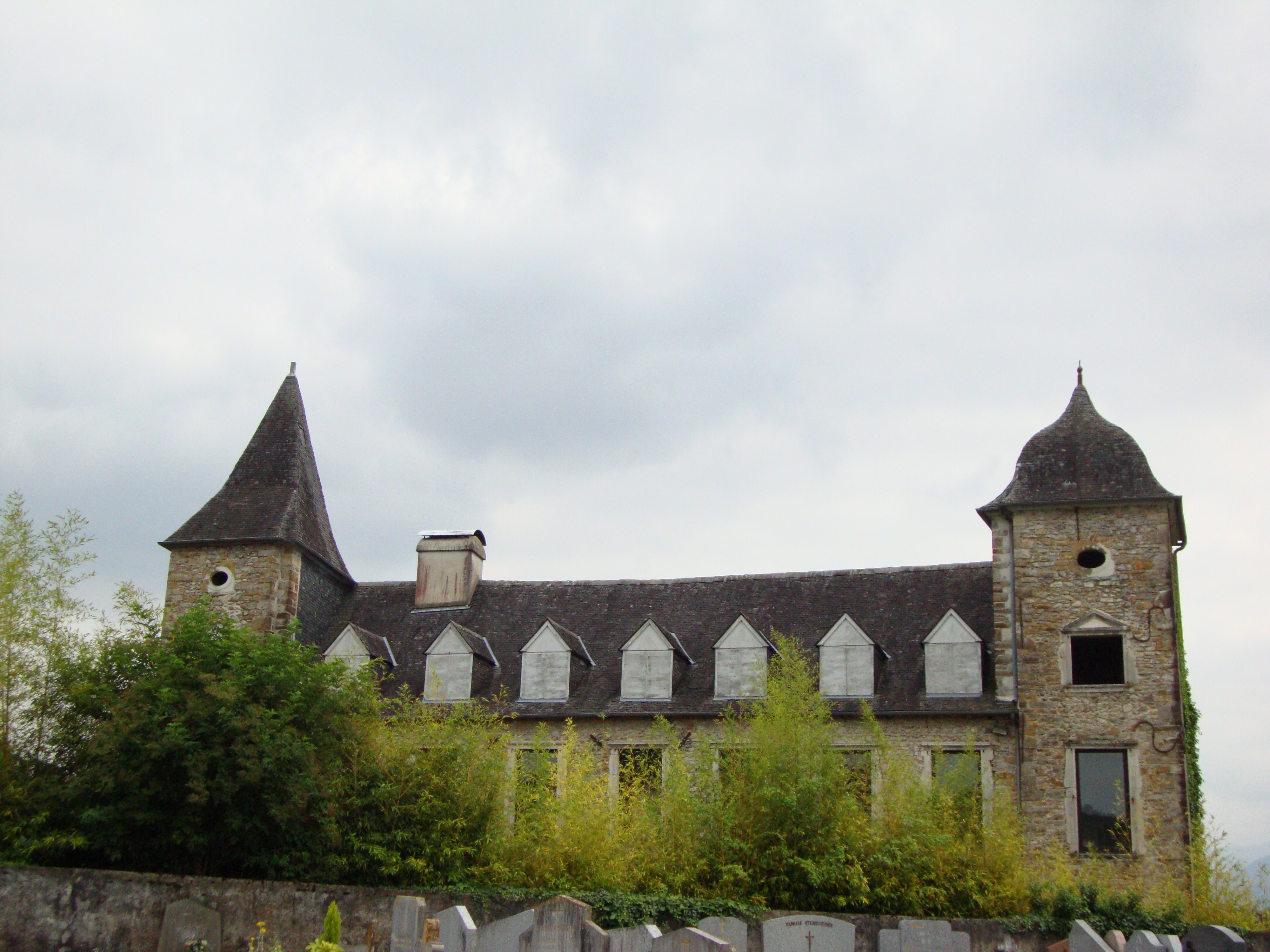 Ledeuix (Pyr-Atl, Fr) castle